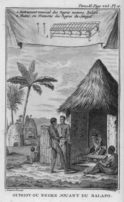 Guiriot ou Nègre jouant du balafo (illustration de Abrégé de l'histoire générale des voyages, par Jean-François de La Harpe )[Volume II. Pl. 10 en reg. p.123 : Sénégal.] Guiriot ou Nègre jouant du balafo. [Cote : Réserve A 200 012]